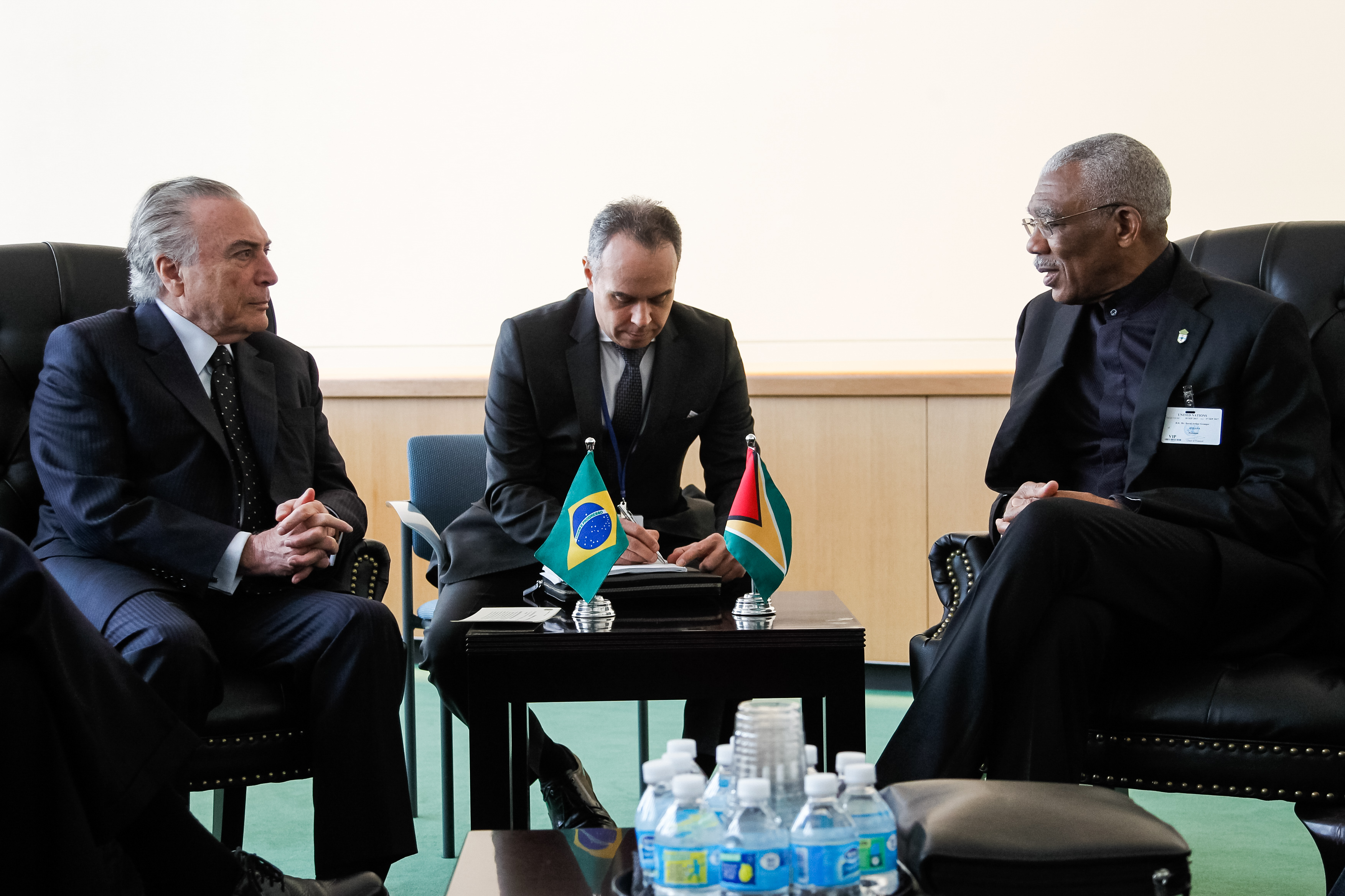 (Nova York - EUA, 20/09/2017) Encontro com o senhor David Granger, Presidente da República Cooperativista da Guiana. Foto: Beto Barata/PR